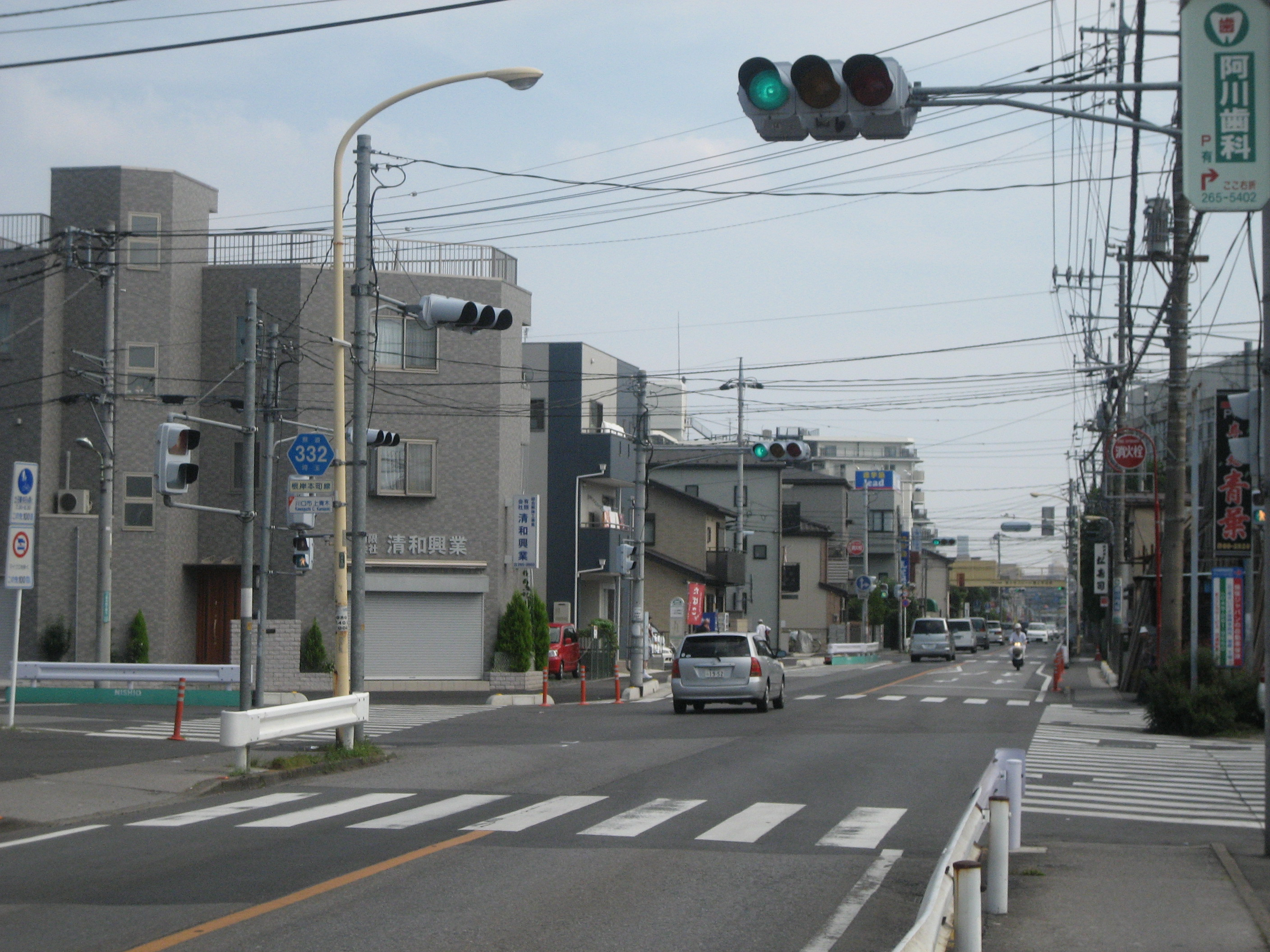 埼玉県道332号線川口市内